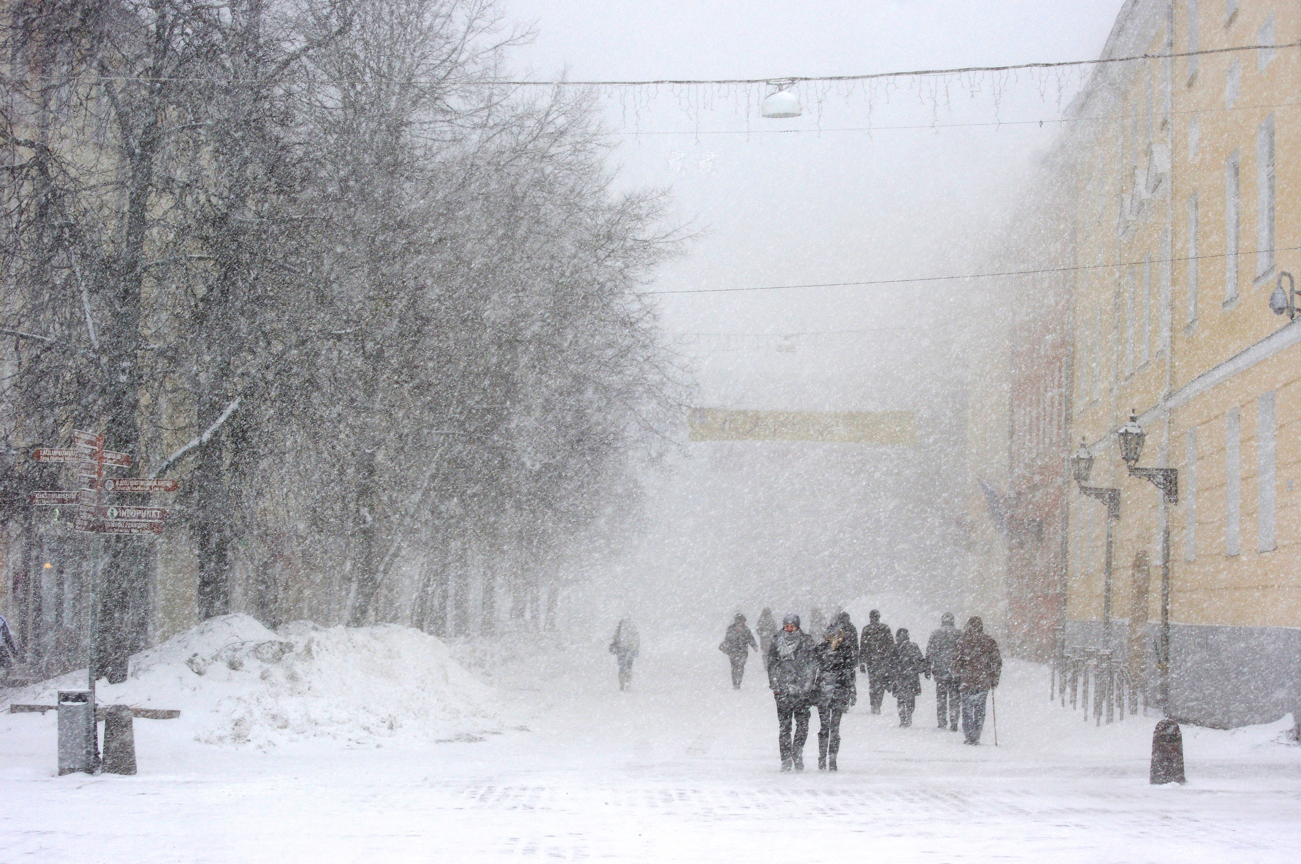 Ootamatu lumetorm Tartus, 25. märts 2011